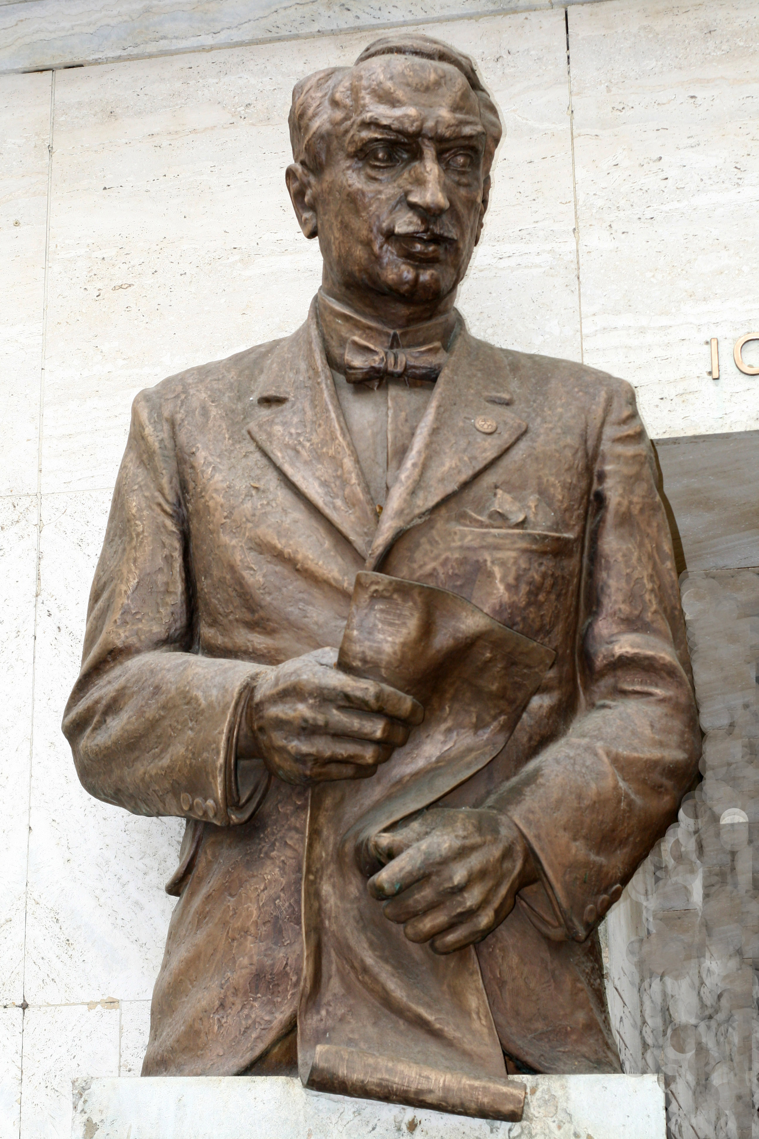 Bronzová plastika Ignáca Gessaya (1877 - 1928) zakladateľa Slovenskej národnej ligy, ktorý ju založil 20. októbra 1920 v Bratislave.